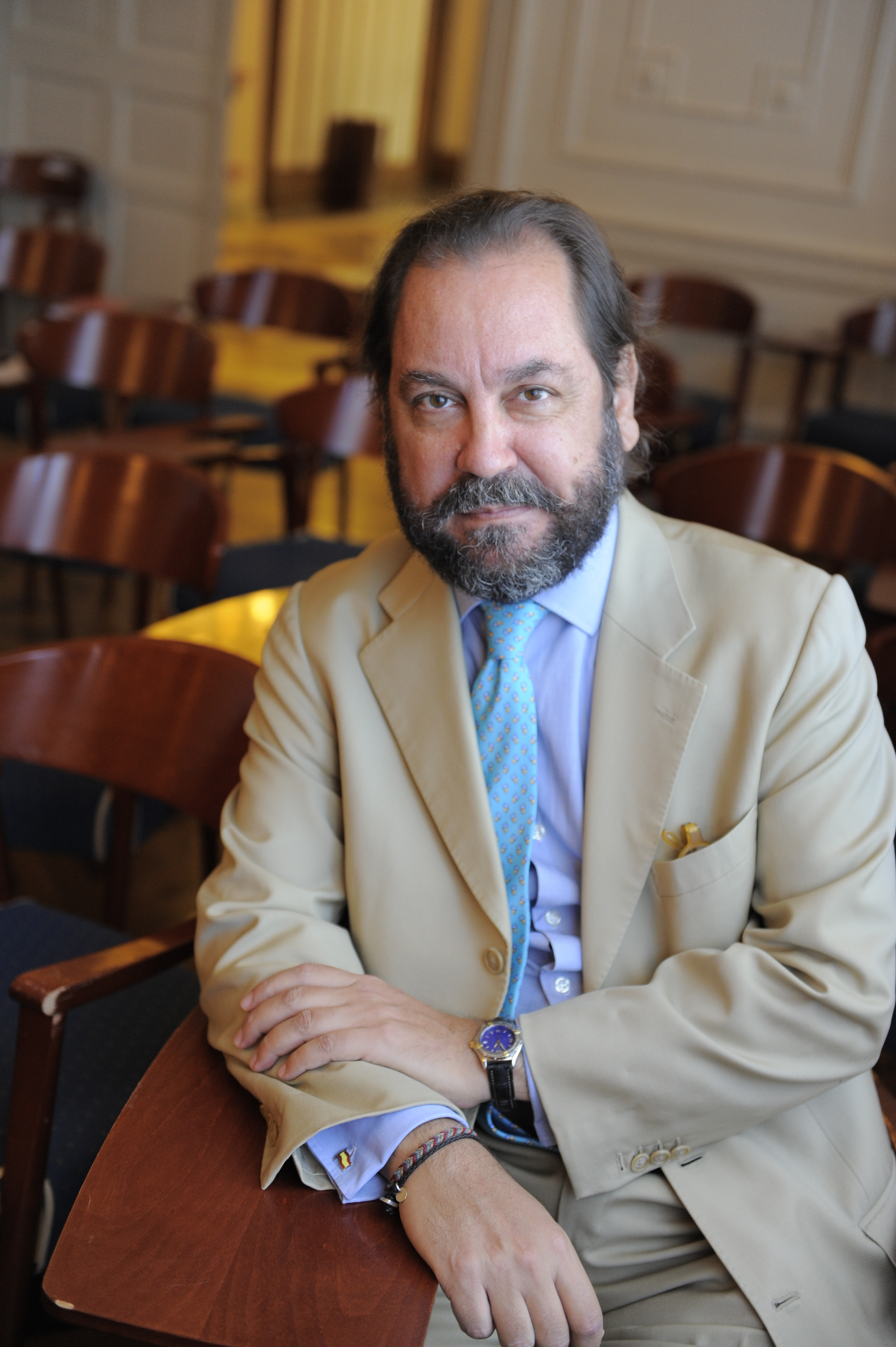 Foto del periodista Ramón Pérez-Maura